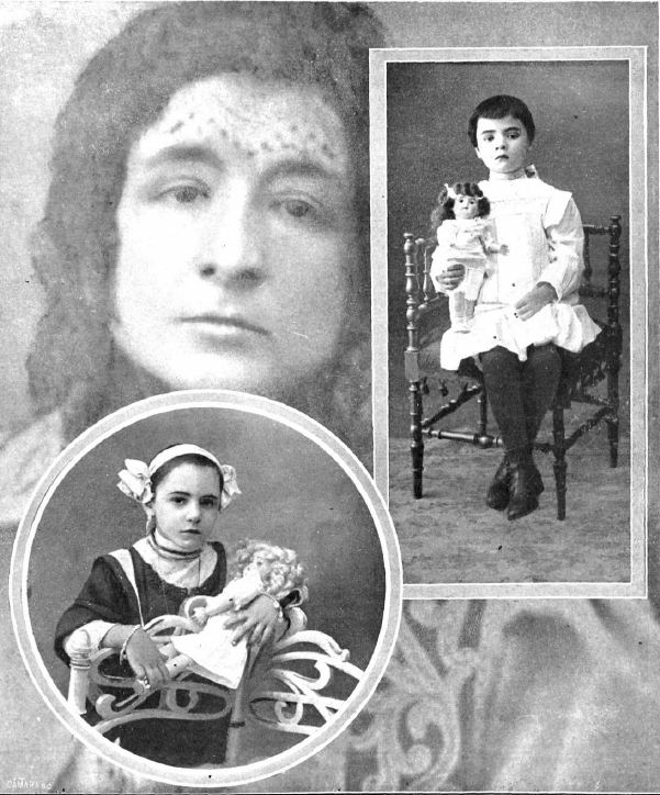 Montaje de fotografías de la asesina, secuestradora y proxeneta de niños española Enriqueta Martín, y sus dos últimas víctimas, las niñas Teresita Guitart Congost y Angelita. Fue publicado en 1912 con motivo de la detención de la criminal y consiguiente liberación de las niñas.